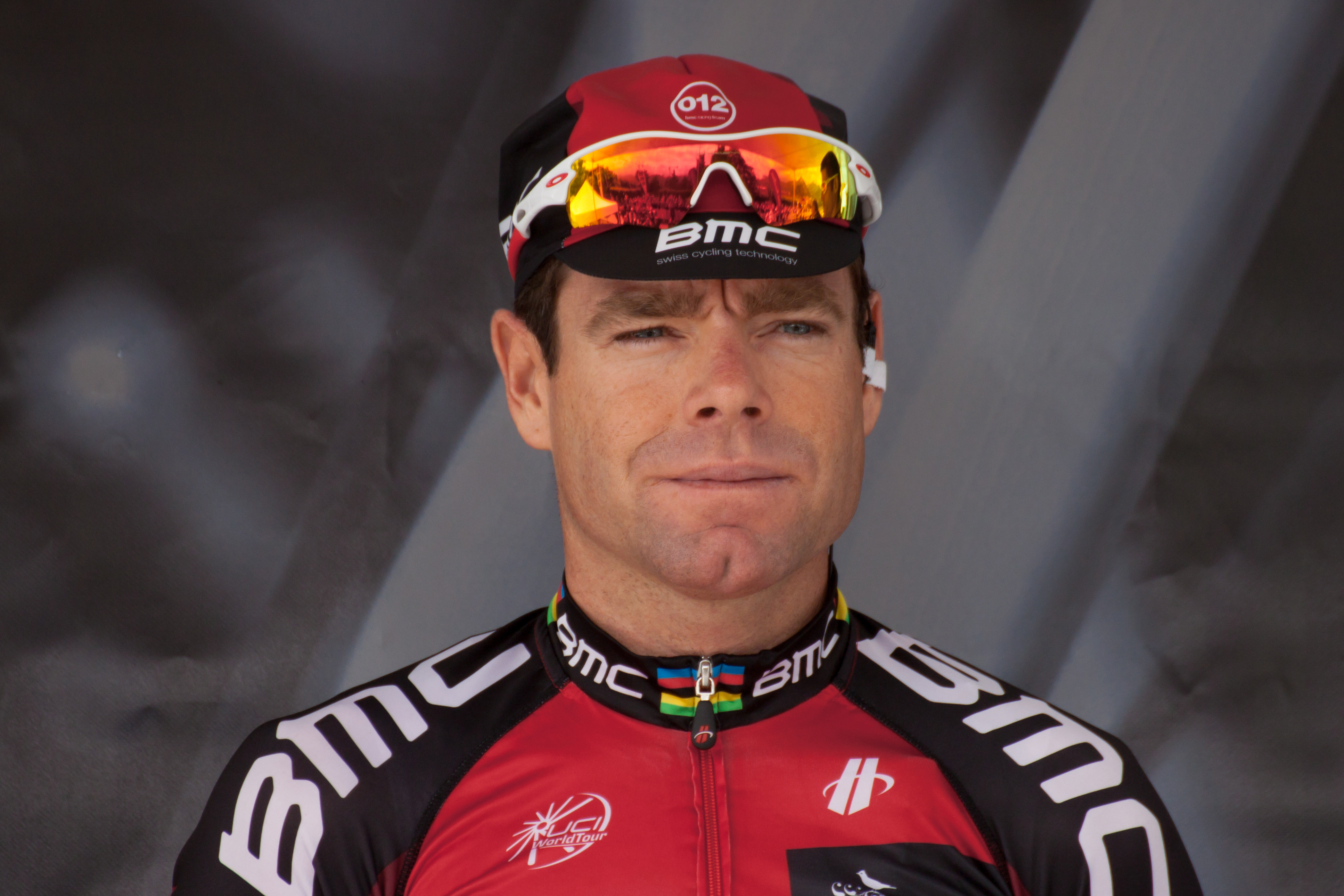 Cadel Evans lors de la présentations des coureurs avant la première étape du Critérium du Dauphiné 2012